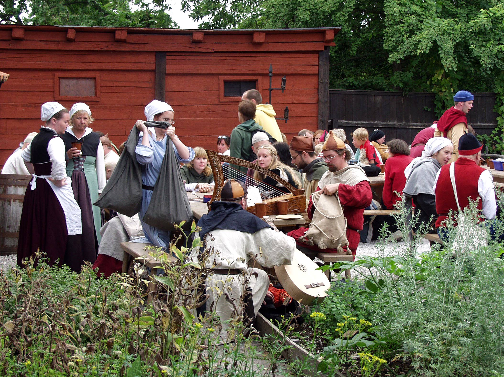 Gruppe mittelalterlich gekleideter Einwohner der gotländischen Stadt Visby anlässlich der Medeltidsveckan.